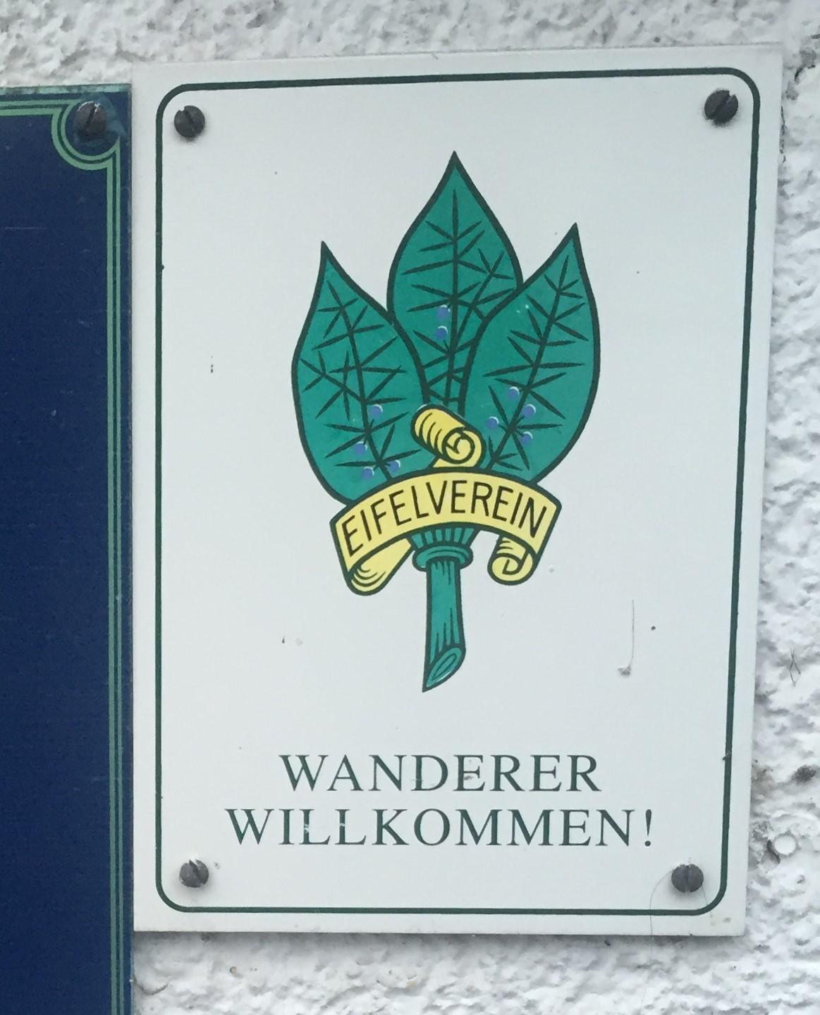 Cartel de bienvenida a excursionistas